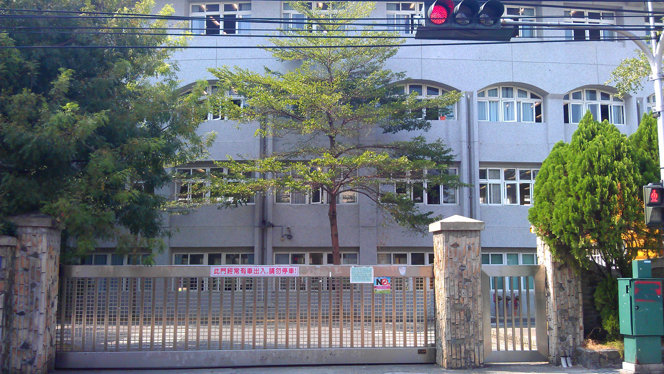 中文（台灣）: 太平區太平國小舊校門